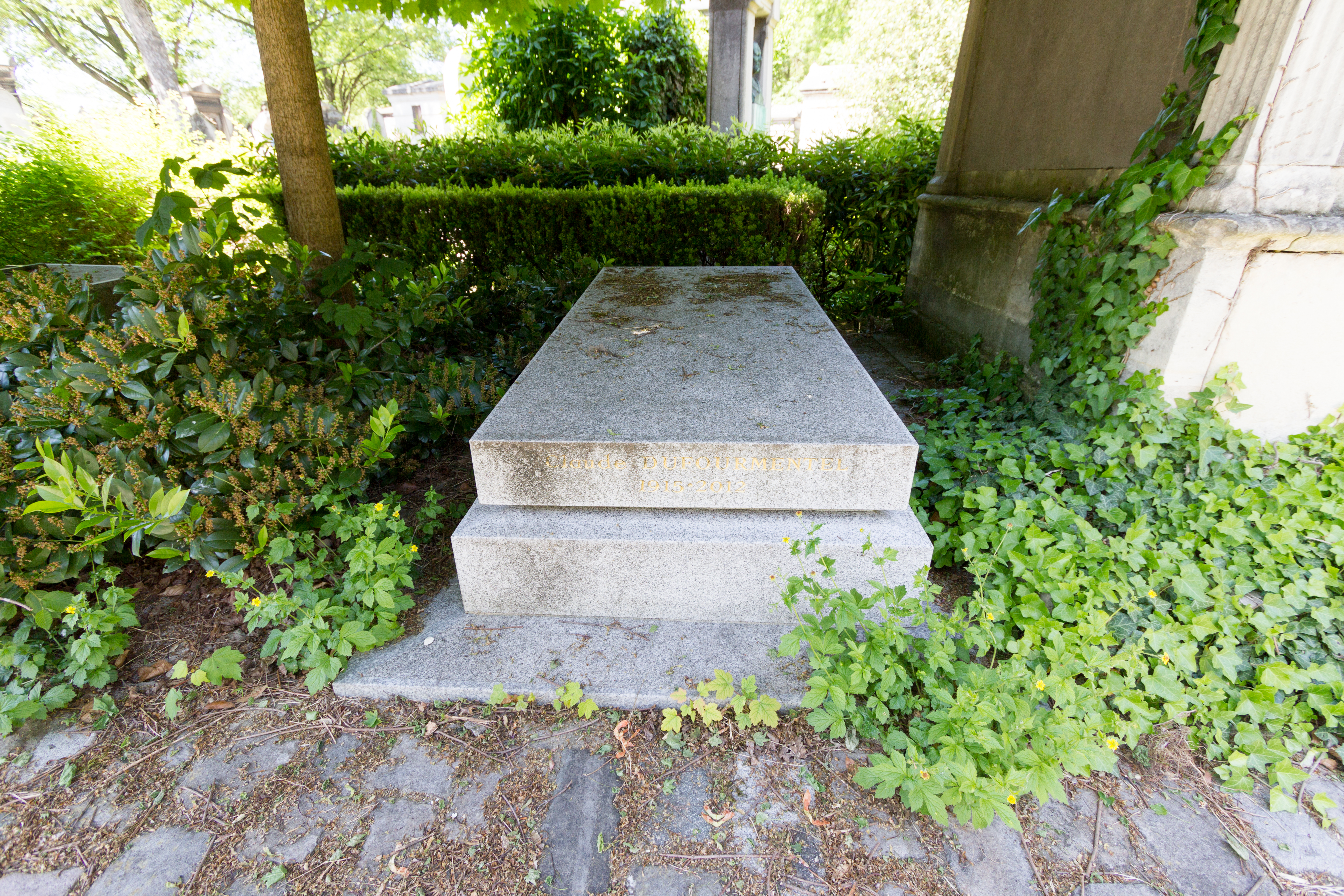 Sépulture de Claude Dufourmentel (1915-2012), chirurgien plasticien, chef de service à l'hôpital Lariboisière, président de la Société française de chirurgie plastique reconstructive ; et son épouse Marianne Dufourmentel née Bollack (1911-2013), médaille de la Résistance.